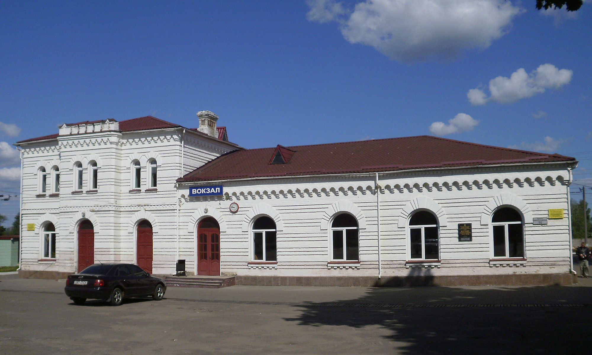 Железнодорожный вокзал